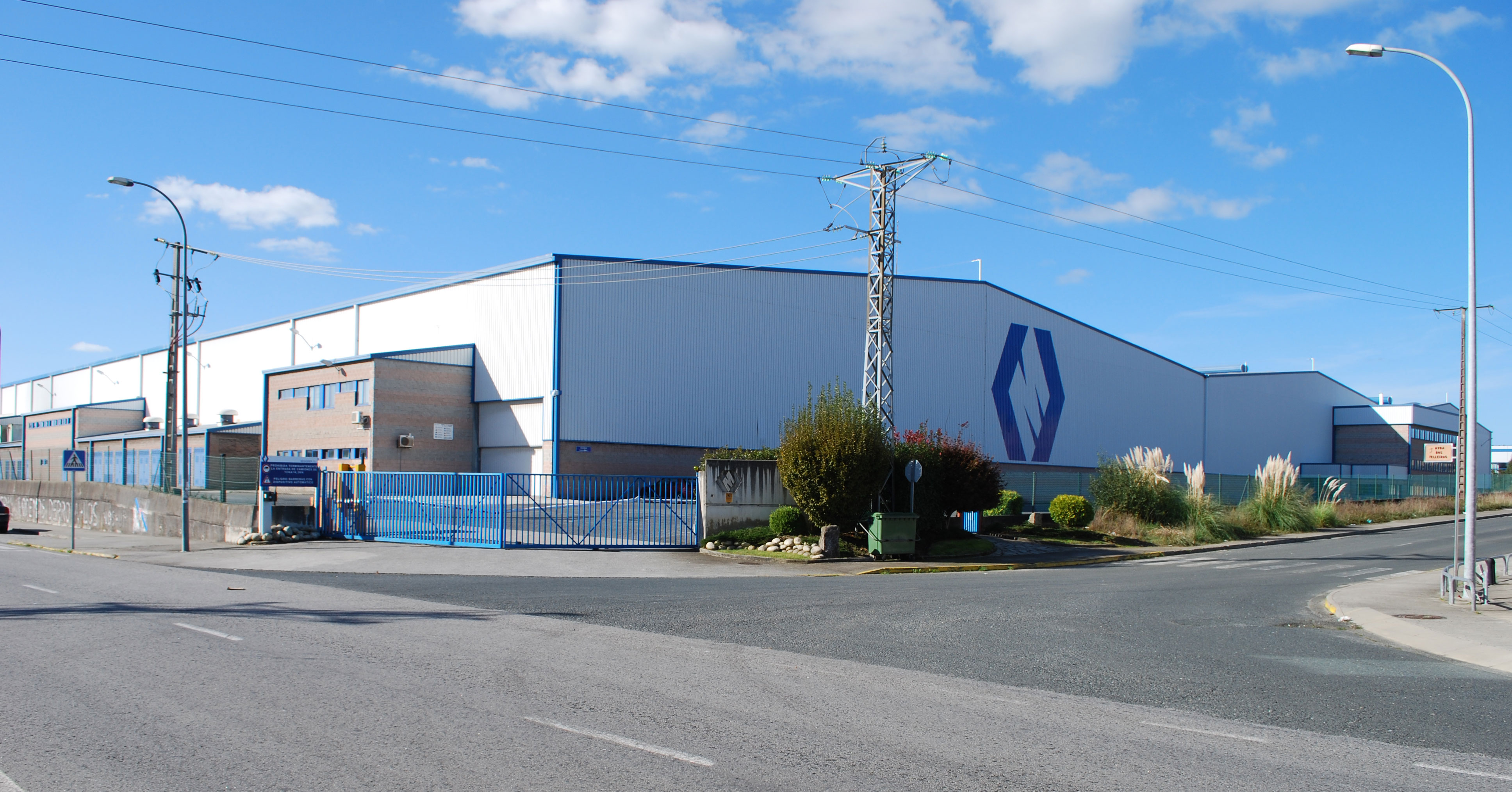 Megasider Megasa Narón A Coruña Galiza Spain